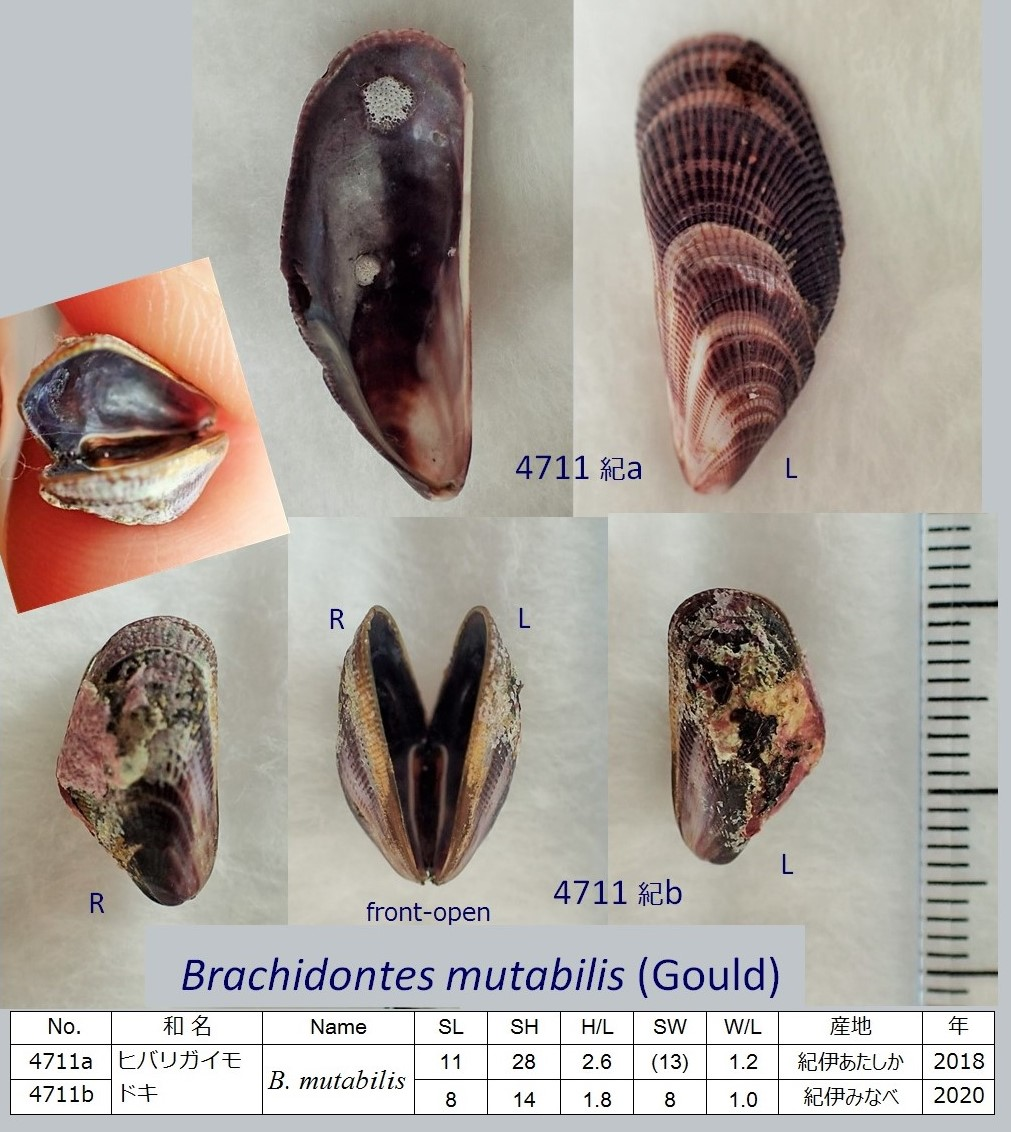 紀伊半島新鹿の片貝と、みなべ町千里の浜でひろった若貝。